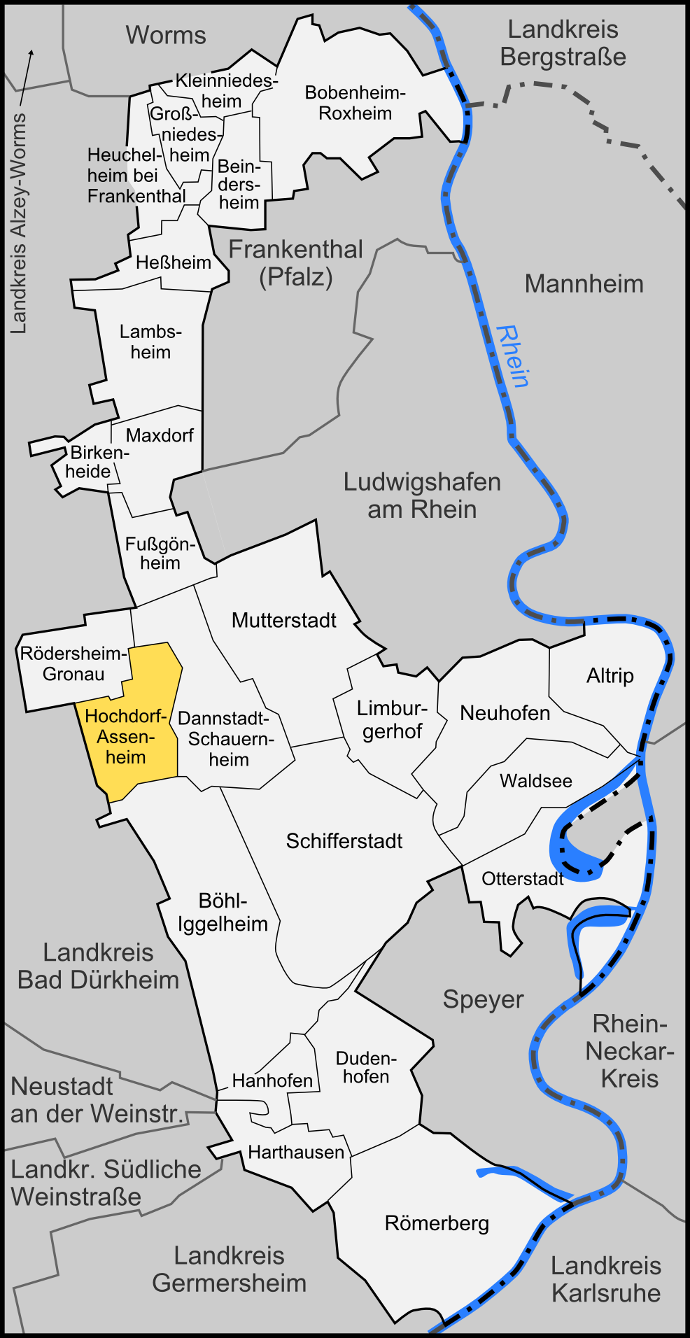 Karte der Gemeinde Hochdorf-Assenheim im Rhein-Pfalz-Kreis